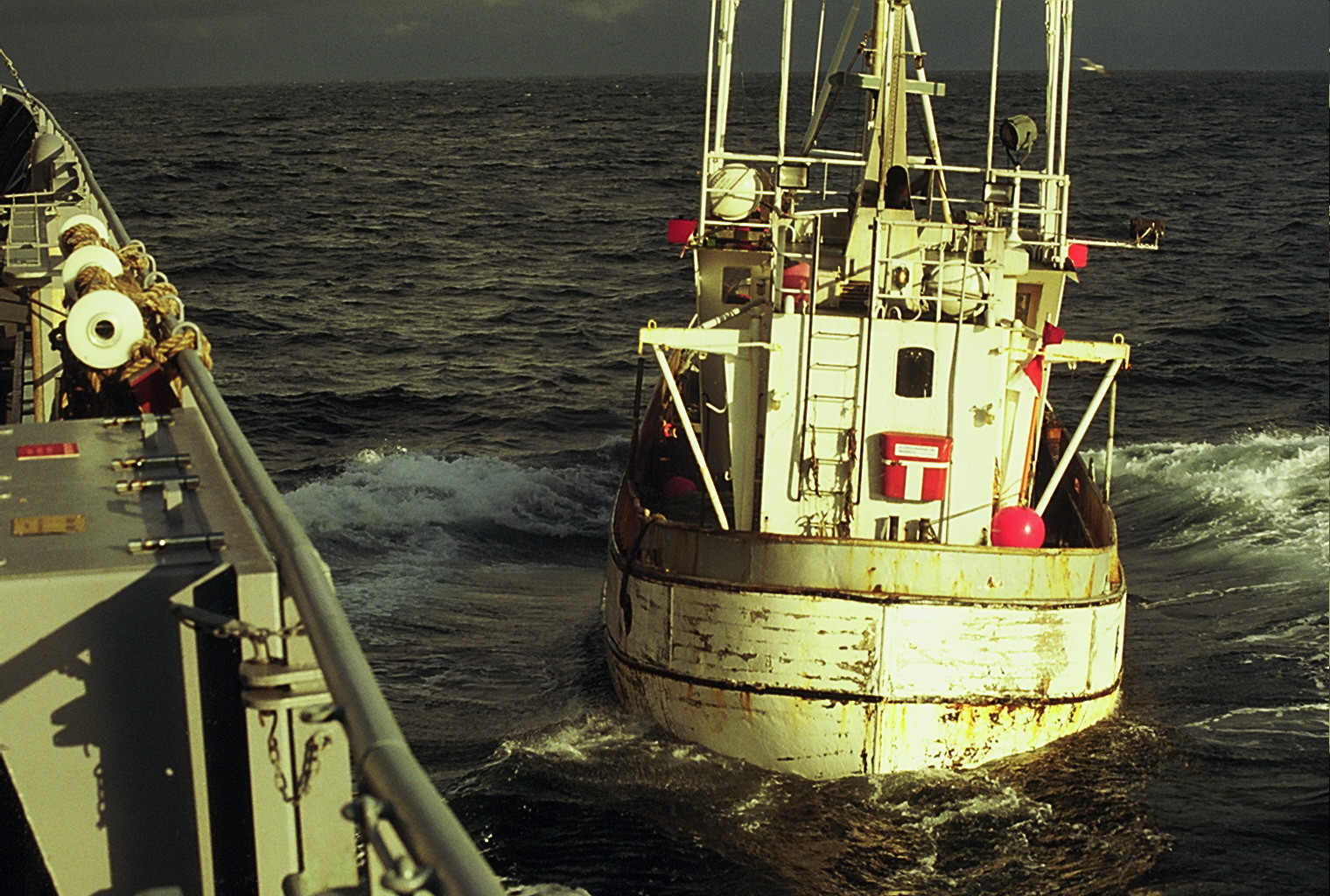 Isländischer Fischkutter, ablaufend vom deutschen Forschungsschiff "Schwedeneck" (Y 861) vor der Südküste Islands